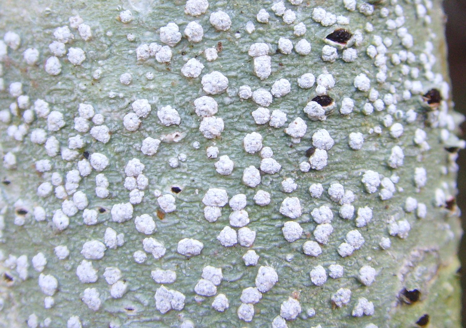 Pertusaria multipuncta, Pont Neuf - Pont Callec (Berné, Morbihan, Betagne, France)